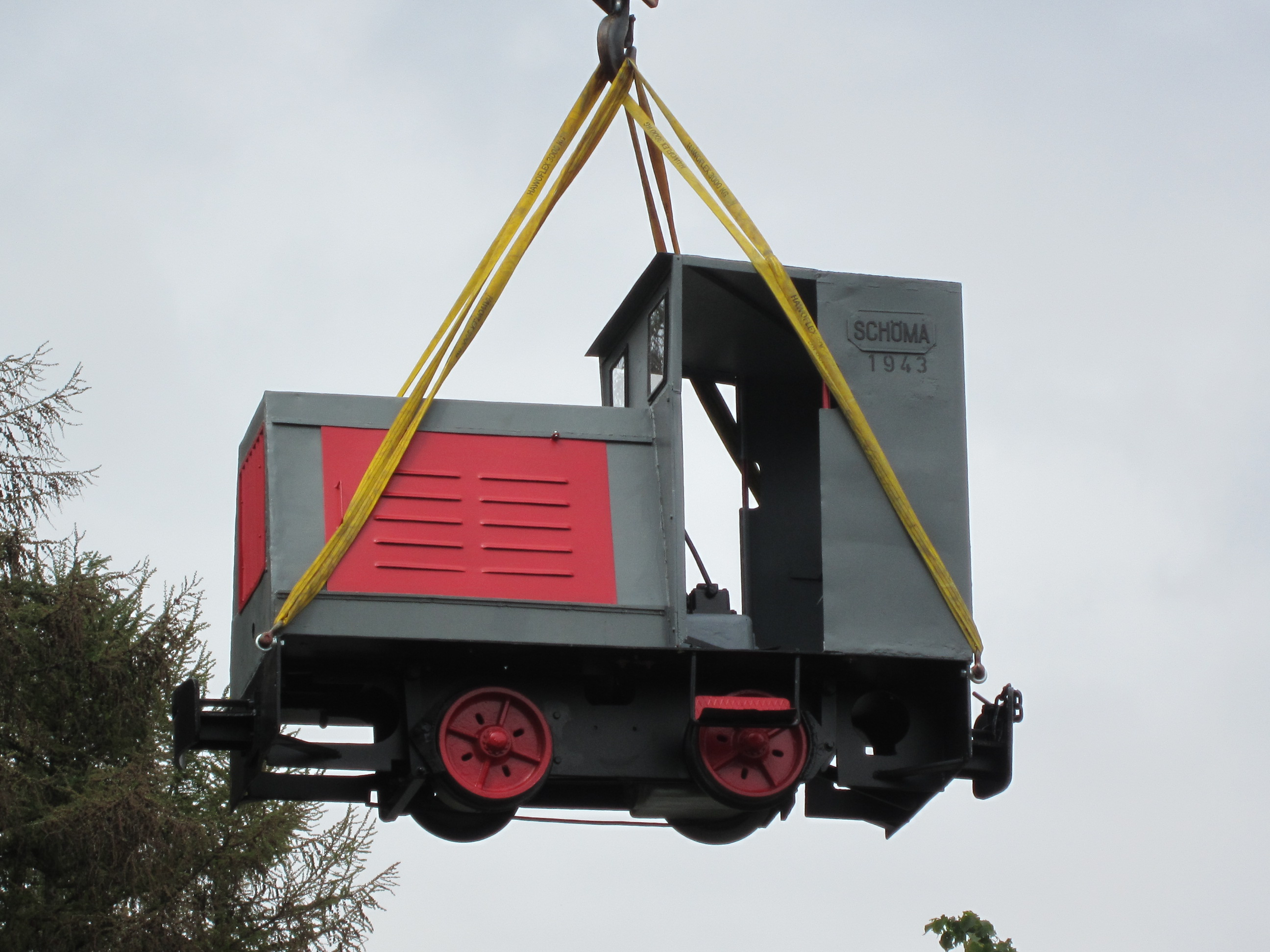 SCHÖMA-Feldbahn-Lokomotive (Jahrgang 1943) auf dem Weg zu ihrem neuen Standplatz auf dem Kreisverkehr Bergweg/Südring/Moorstraße in Lohne